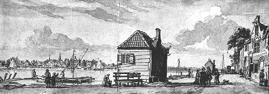 Schaardijk bij het Kralingse veer, in de verte het dorp IJsselmonde